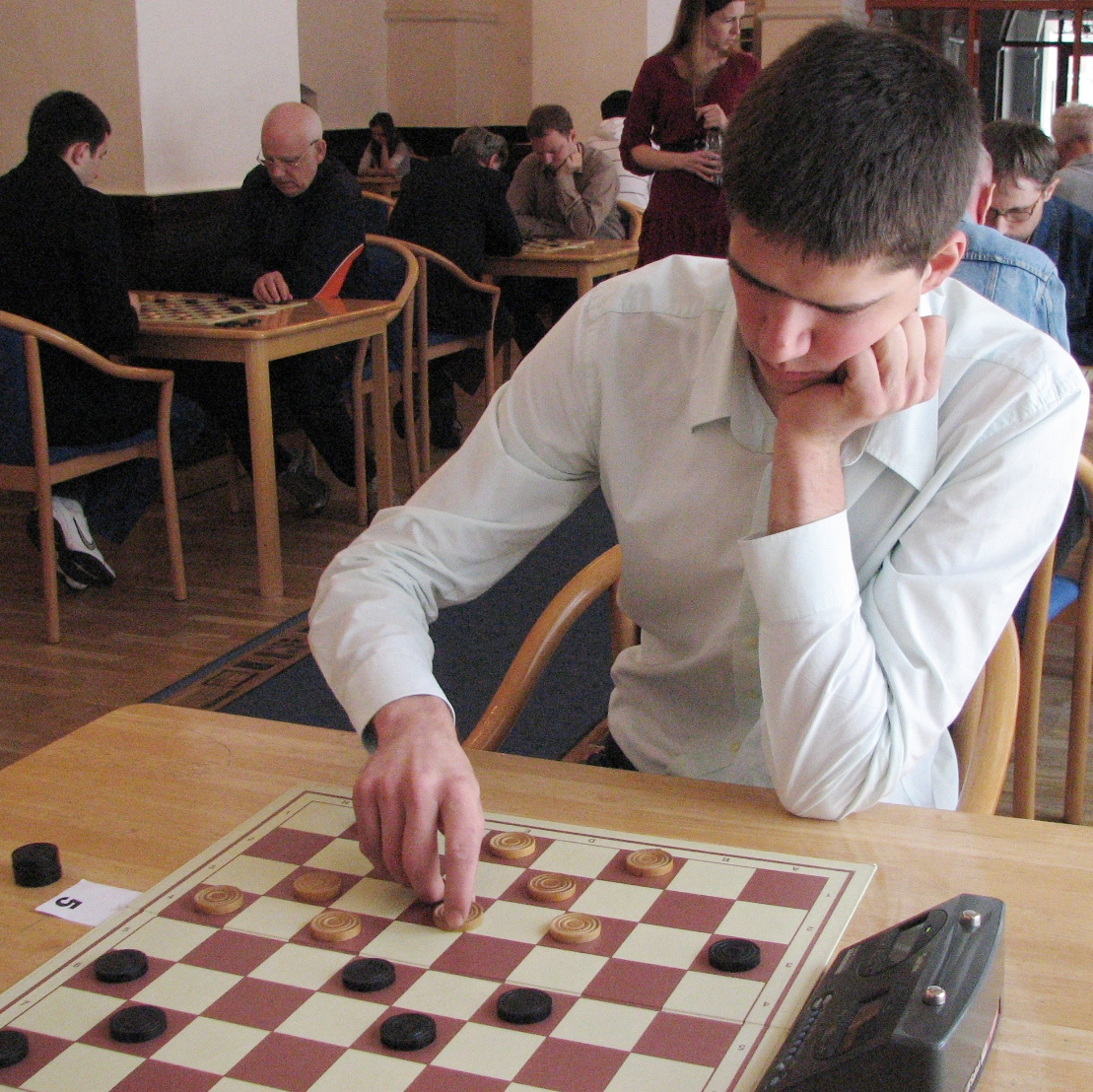 Konstantin Selli mängimas Eesti välkkabe meistrivõistlustel